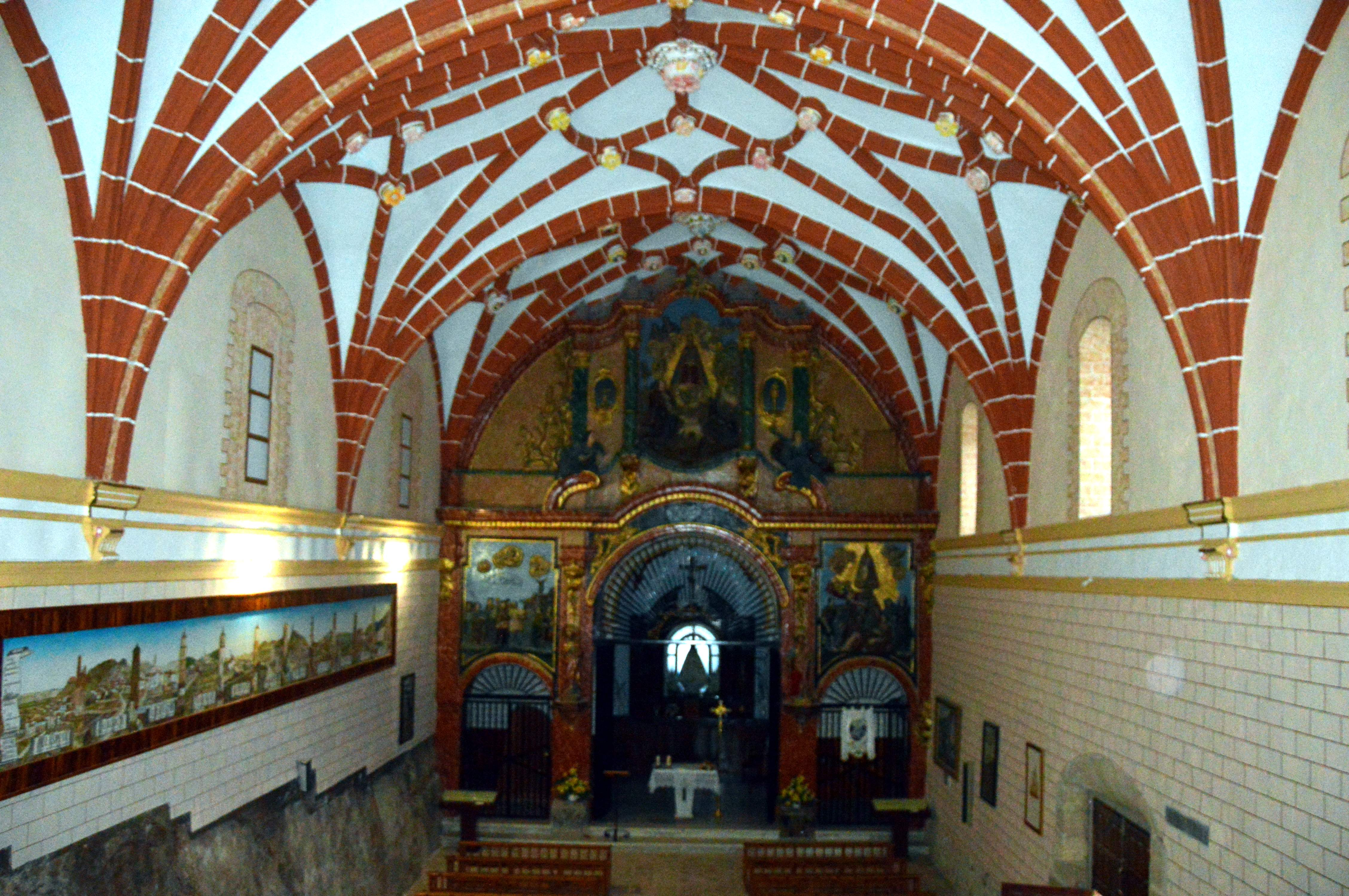 Vista general de la nave del Santuario de la Fuensanta en Villel (Teruel), desde el coro, con el frontal del presbiterio al fondo (2019).